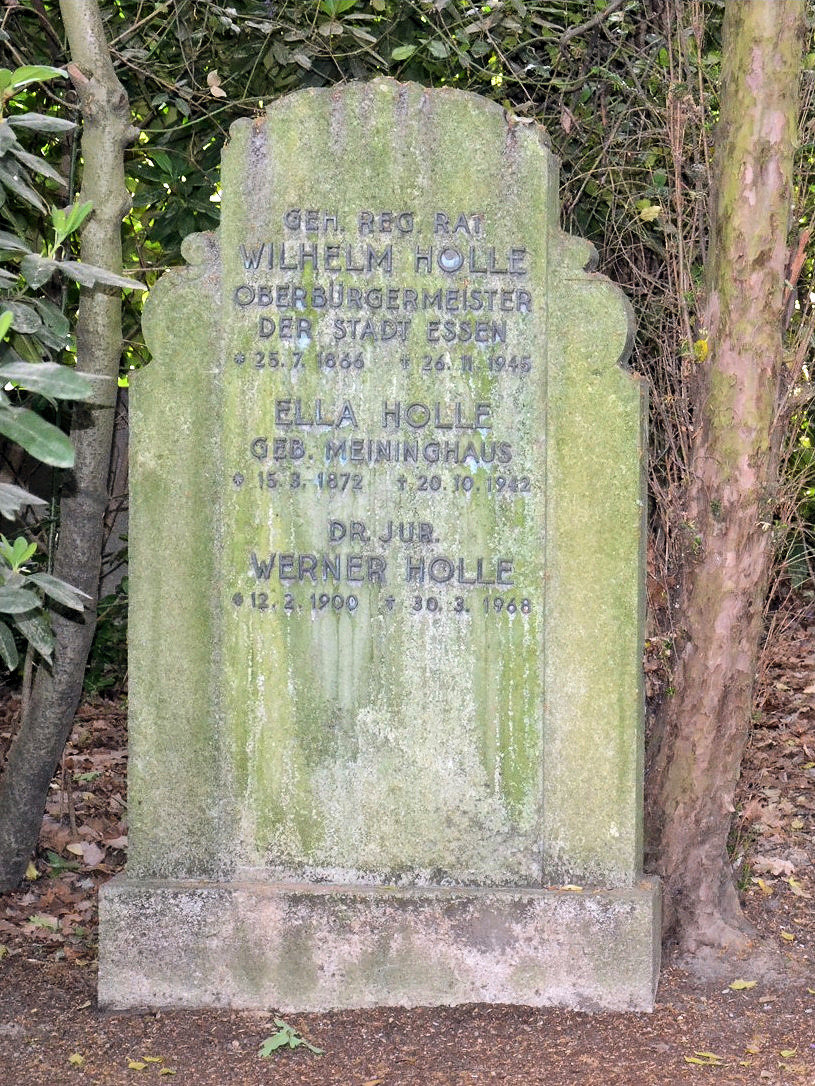 Wilhelm Holles (Bürgermeister der Stadt Essen) "Ehrengrab der Stadt Essen" auf dem Essener Südwestfriedhof